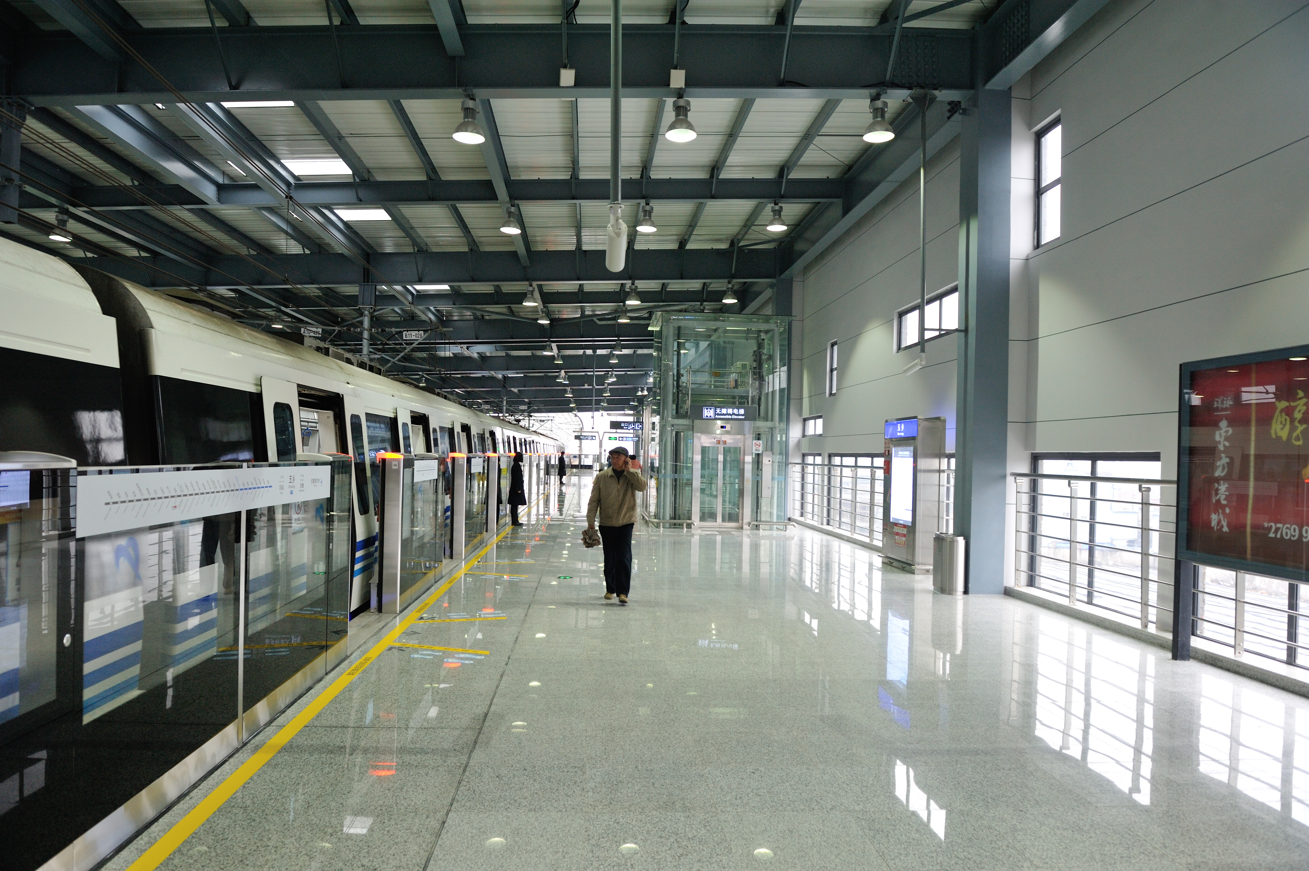 宁波轨道交通五乡站